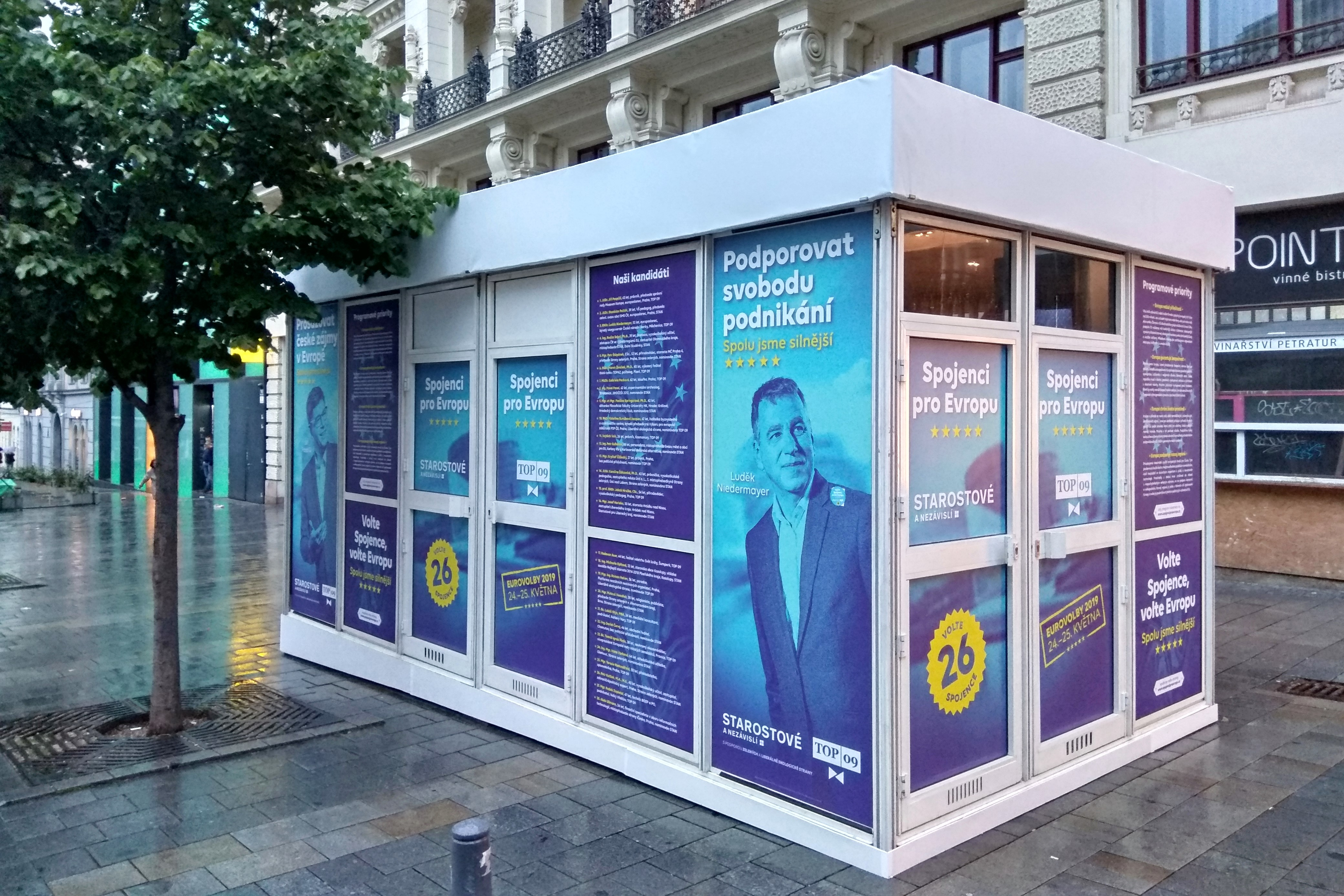 Předvolební plakát Spojenců pro Evropu 15. května 2019 před volbami do Evropského parlamentu. Umístěný na na náměstí Svobody v Brně, poblíž ústí Masarykovy ulice.